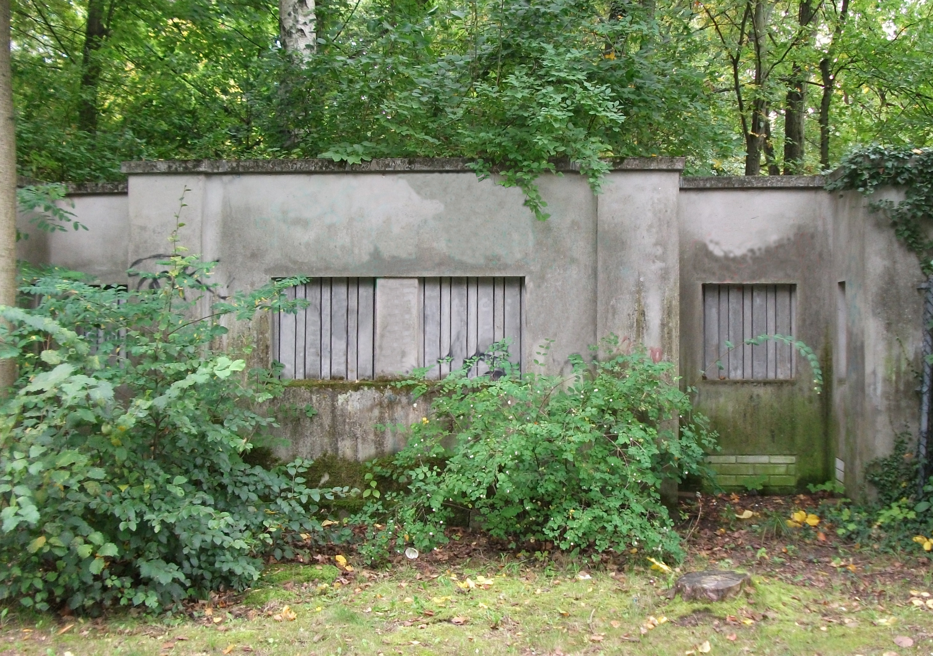 Berlin Park Glienicke Betonmauer von 1911 am Jagdschloss